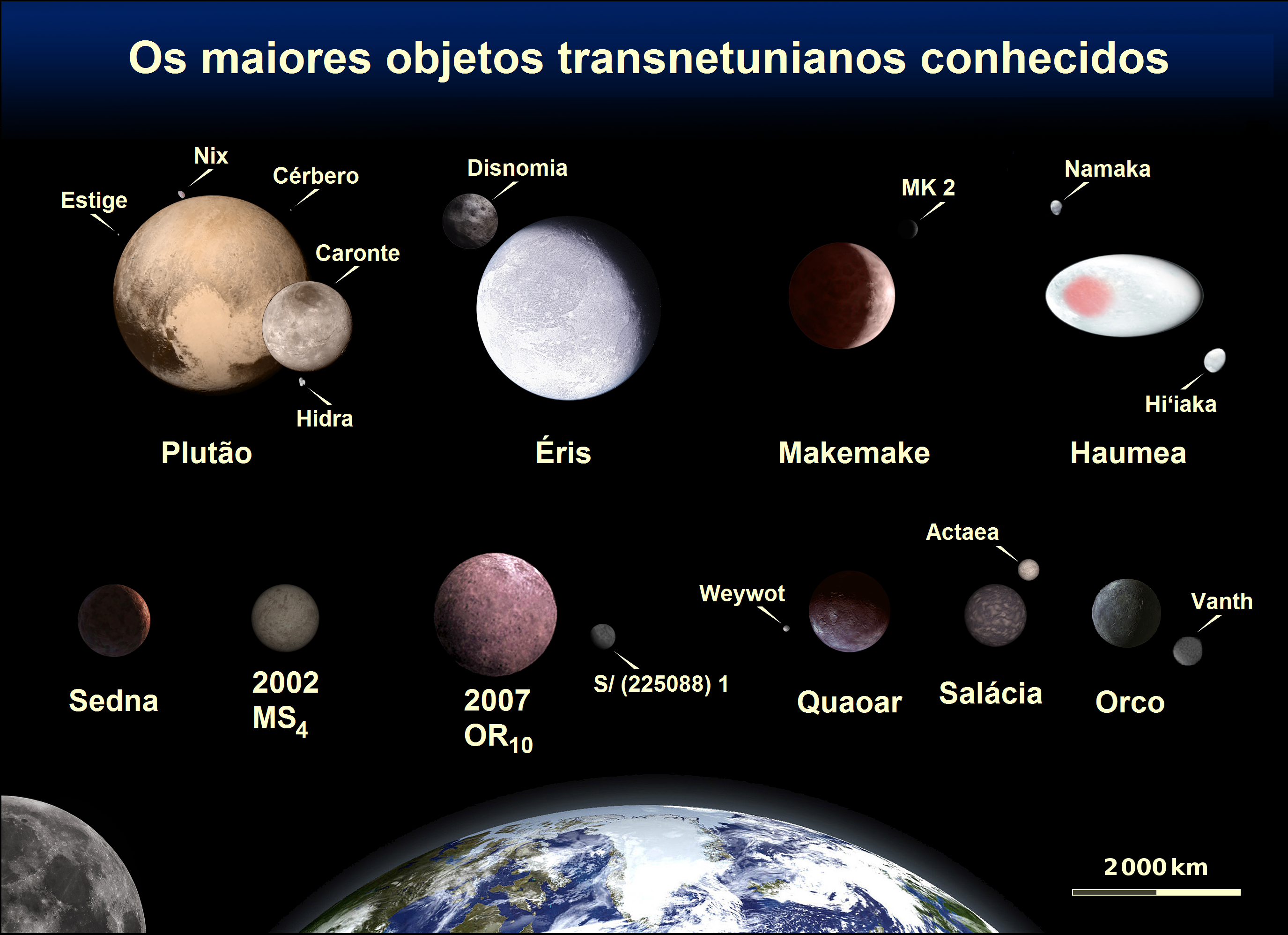 Português do Brasil: Comparação dos tamanhos dos maiores objetos transnetunianos conhecidos.